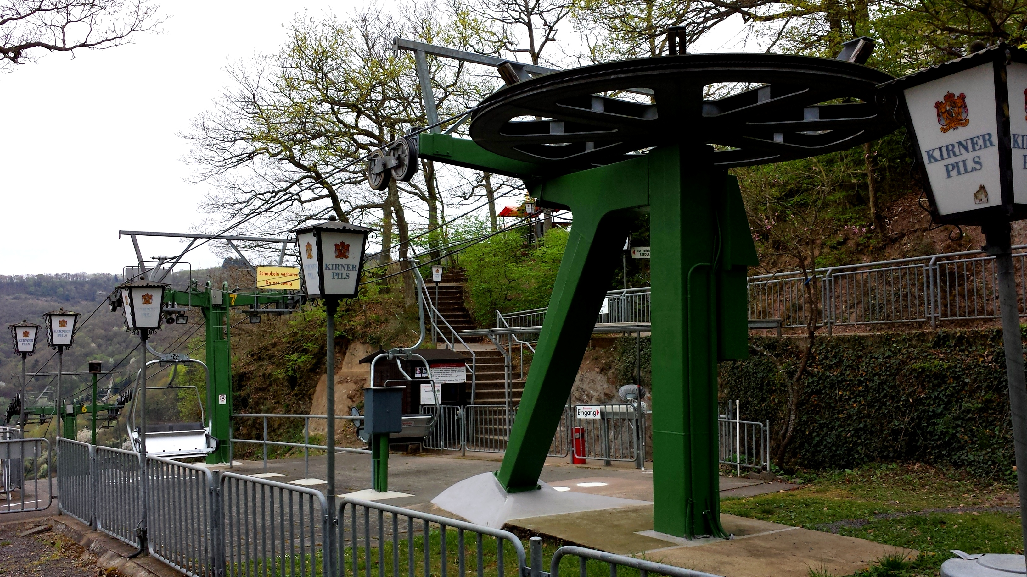 Bergstation der Cochemer Sesselbahn